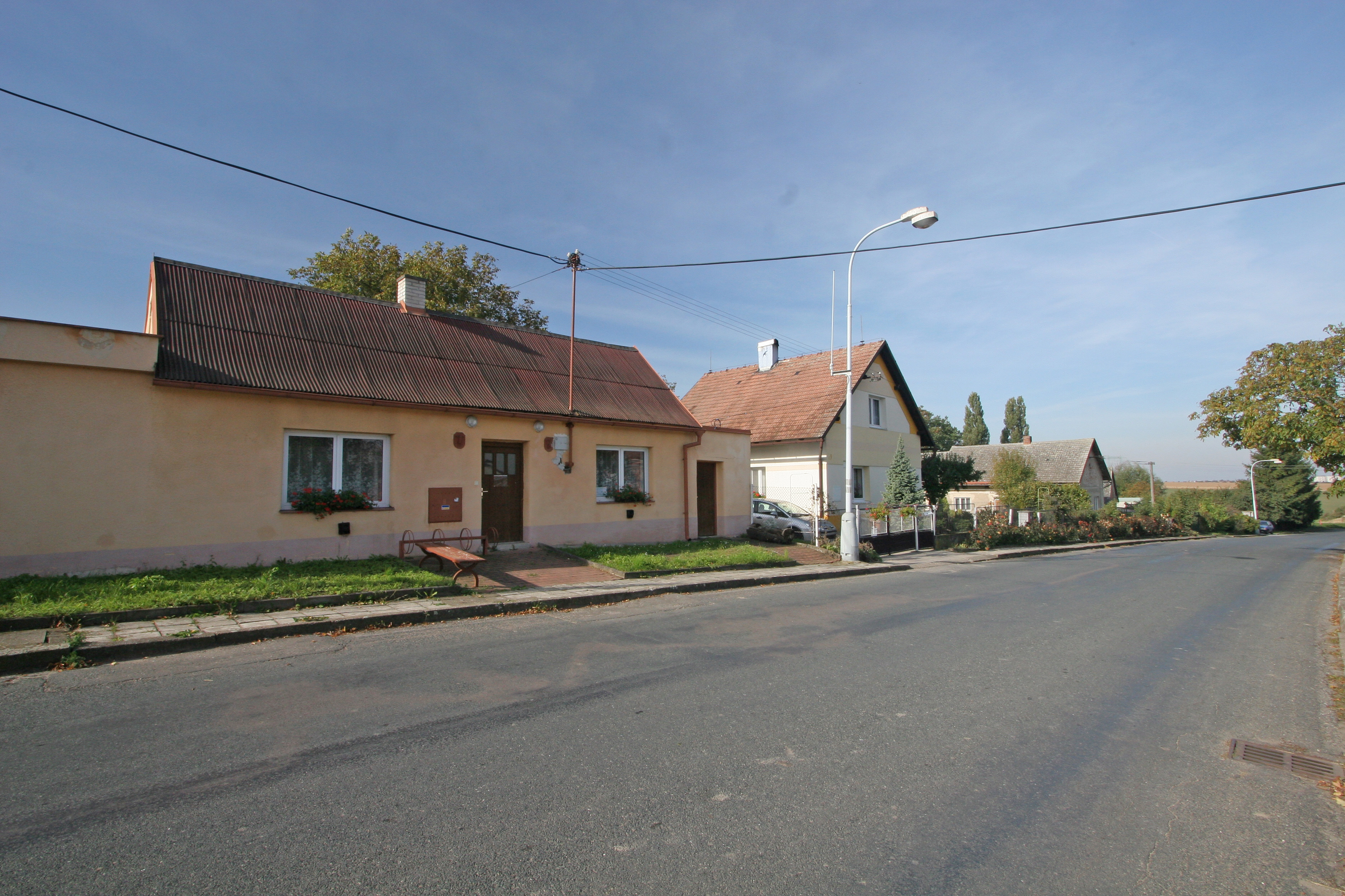 Štěpánov u Přelouče čp. 10